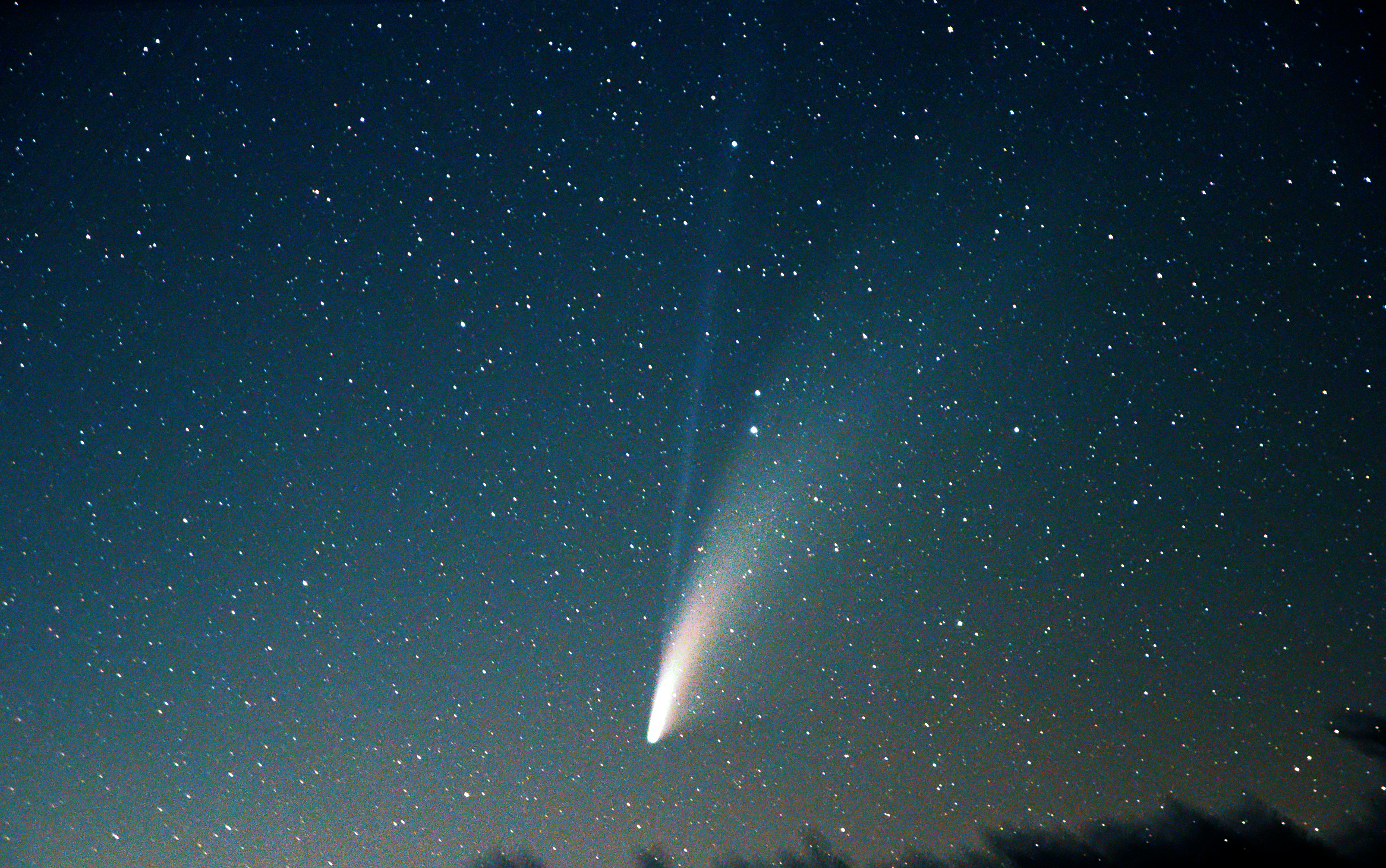 La Cometa C/2020 F3 Neowise ripresa il 19 luglio 2019 da Villanovaforru (SU) da Davide Batzella. Si nota la seconda coda di ioni di colore azzurro.